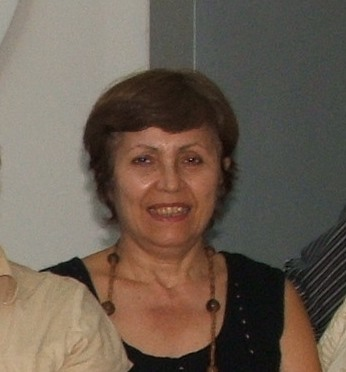 La poetisa paraguaya Susy Delgado en 2011.